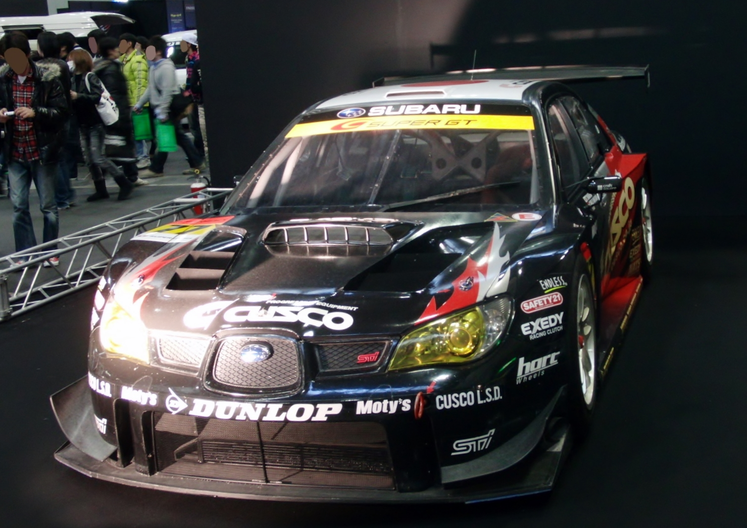 NAGOYAオートトレンド2011において2008年仕様クスコDUNLOPスバルインプレッサを撮影。